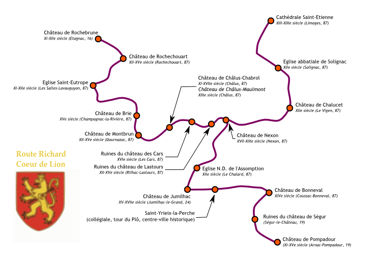 Plan de la route Richard Coeur de Lion (France)